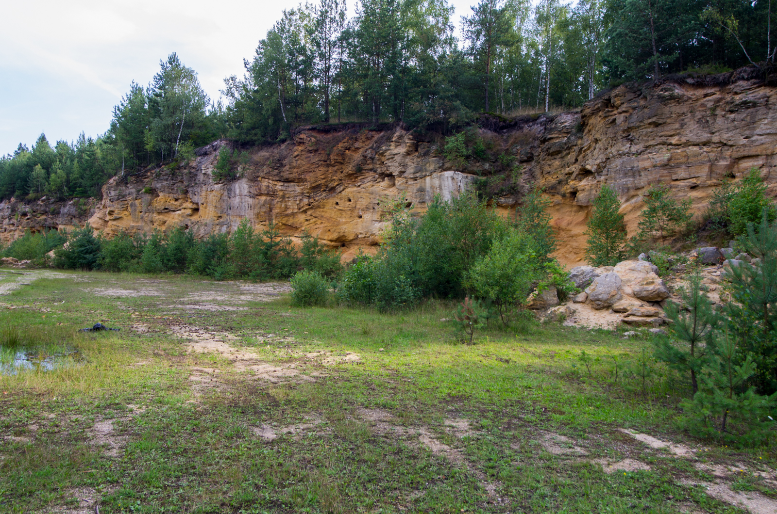 Pískovna Erika, Evropsky významná lokalita, okres Sokolov